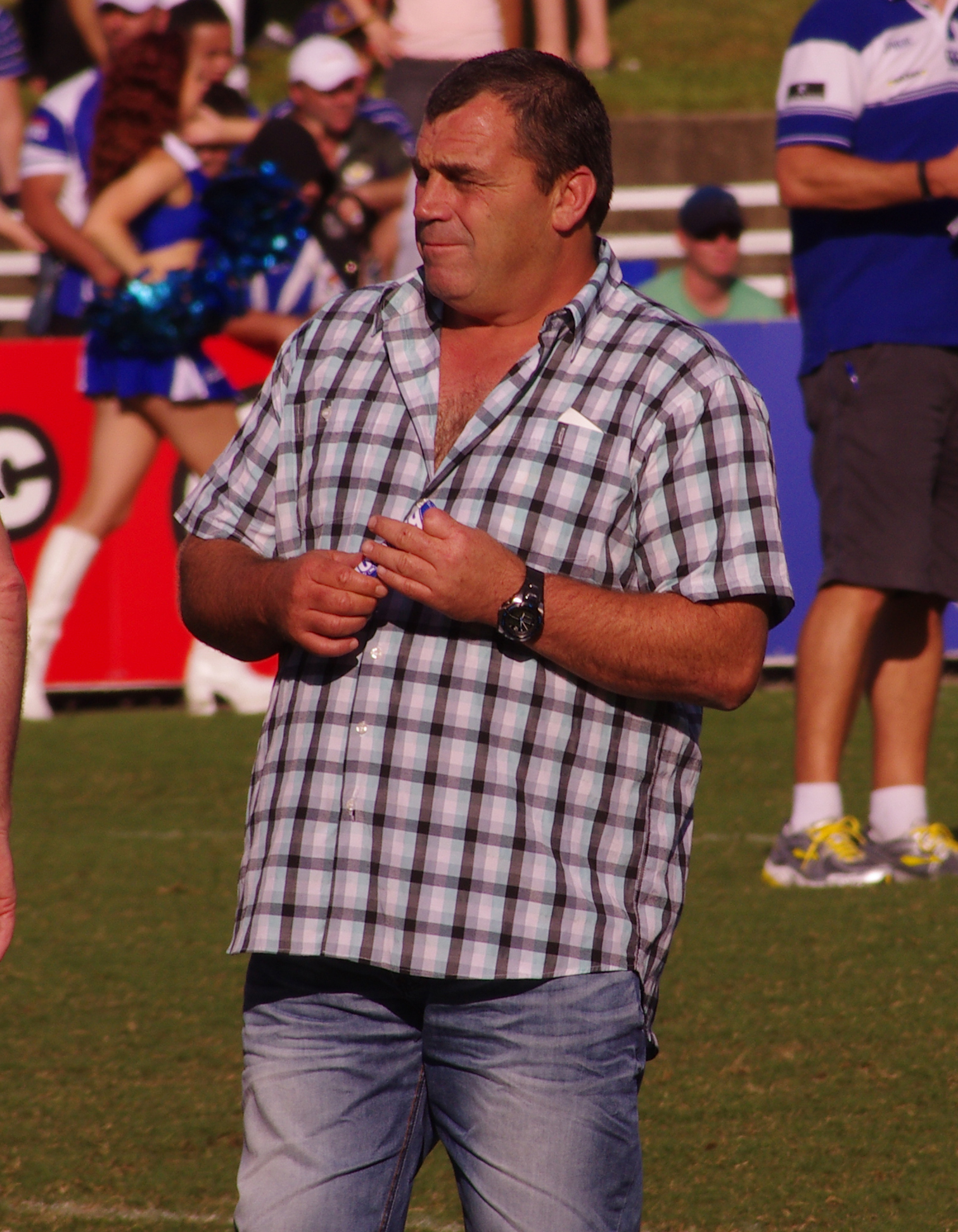 David gillespie